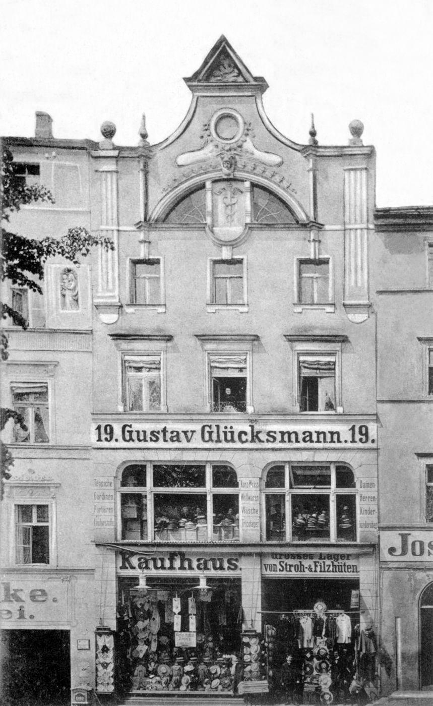 Kaufhaus "Gustav Glücksmann" am Ring in Glatz im 19. Jhdt.